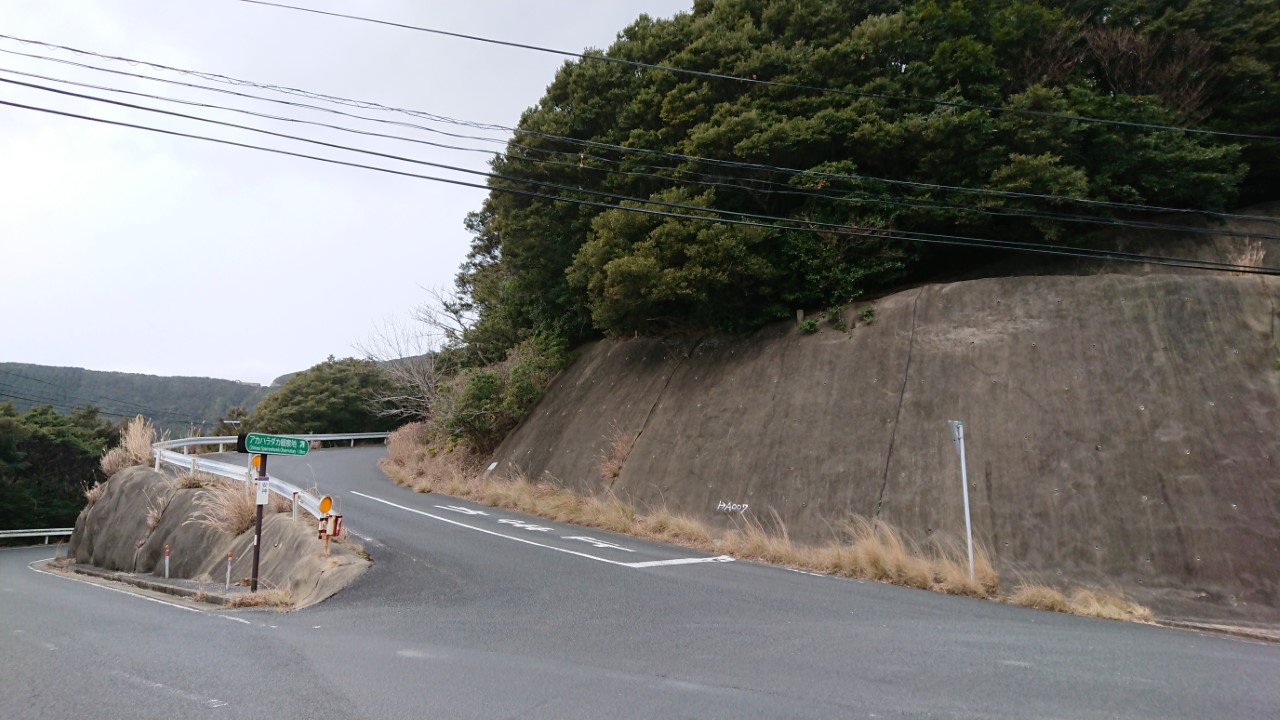 旧・長崎県道192号瀬浦厳原港線 終点（安神）